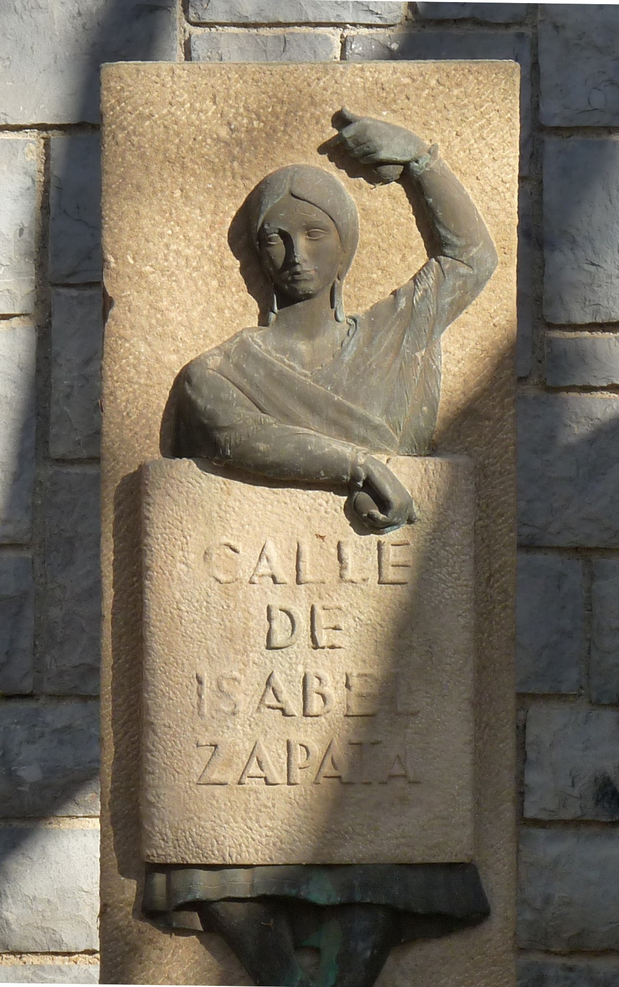 Zaragoza - Monumento a Isabel Zapata en el Parque Grande